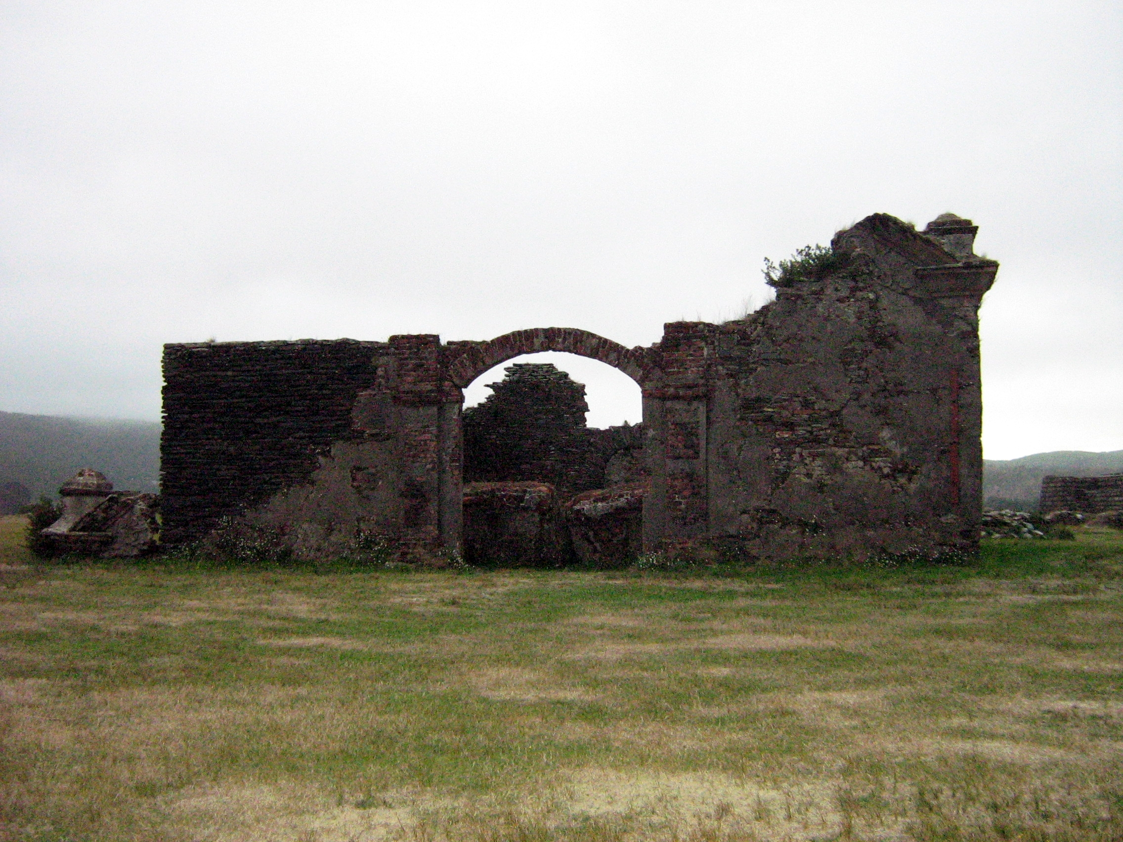 Fachada de la iglesia de San Antonio, construida por los franciscanos a mediados del s. XVIII, en el fuerte San Pedro de Alcántara, en la isla Mancera, Corral, Chile. This is a photo of a national monument in Chile: 172